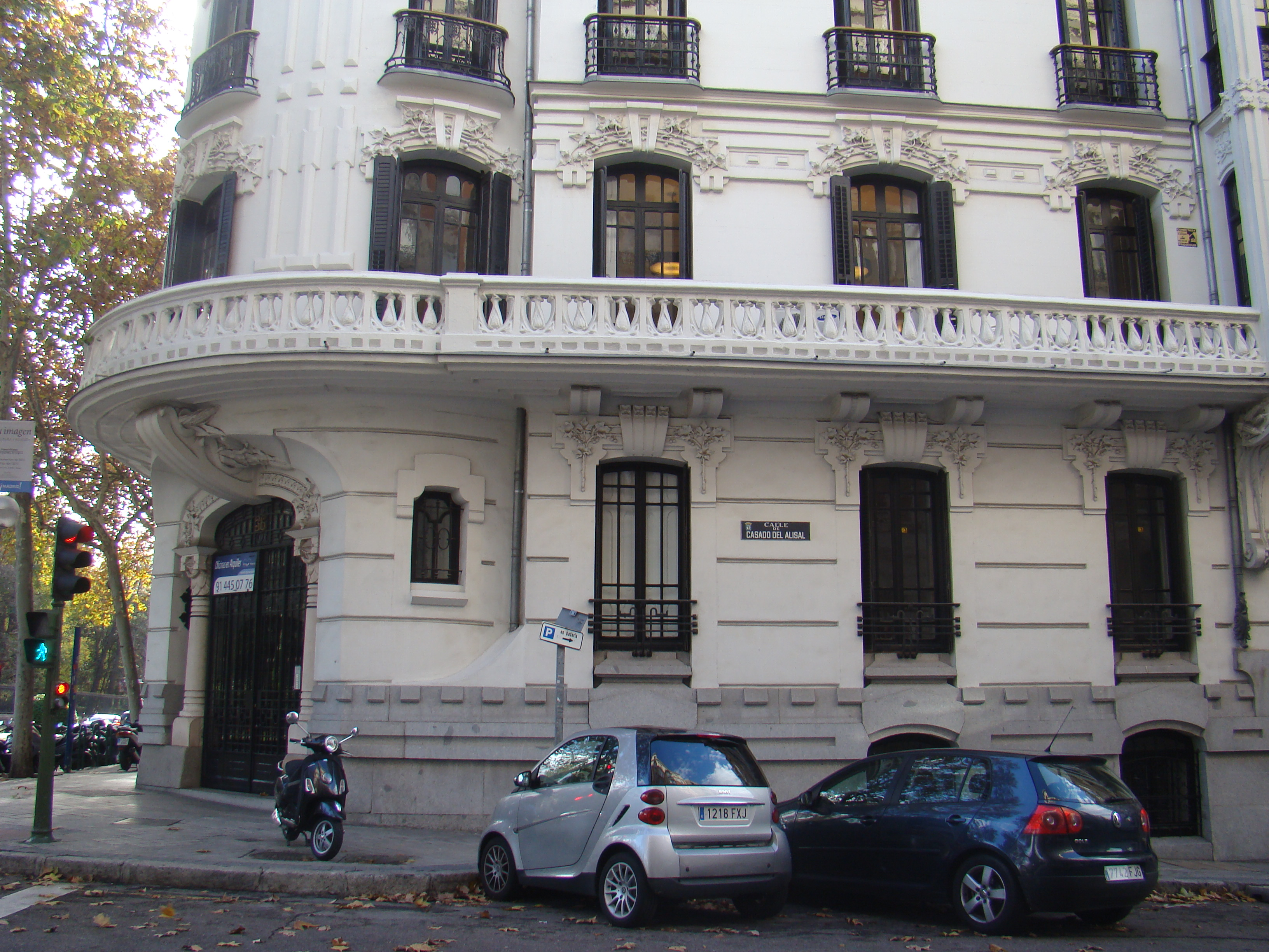 Madrid, España. Calle de Alfonso XII esquina a Casado del Alisal. Barrio de los Jerónimos. Dos viviendas modernistas del diseñador García Nava.